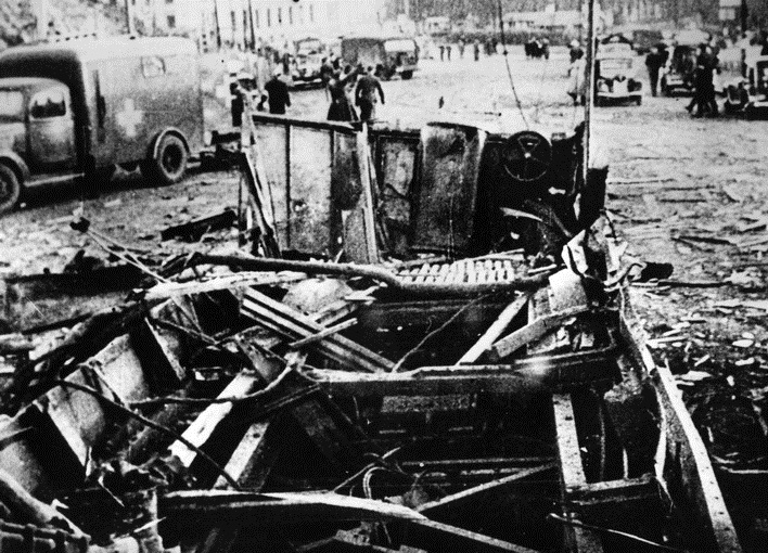 Vrak av trikk, vogn 115. Fra feilbombingen av Victoria terasse 31. desember 1944, 55 omkom i denne trikkekatastrofen. Drammensveien, med Universitetet i bakgrunnen. Ambulanser, biler.